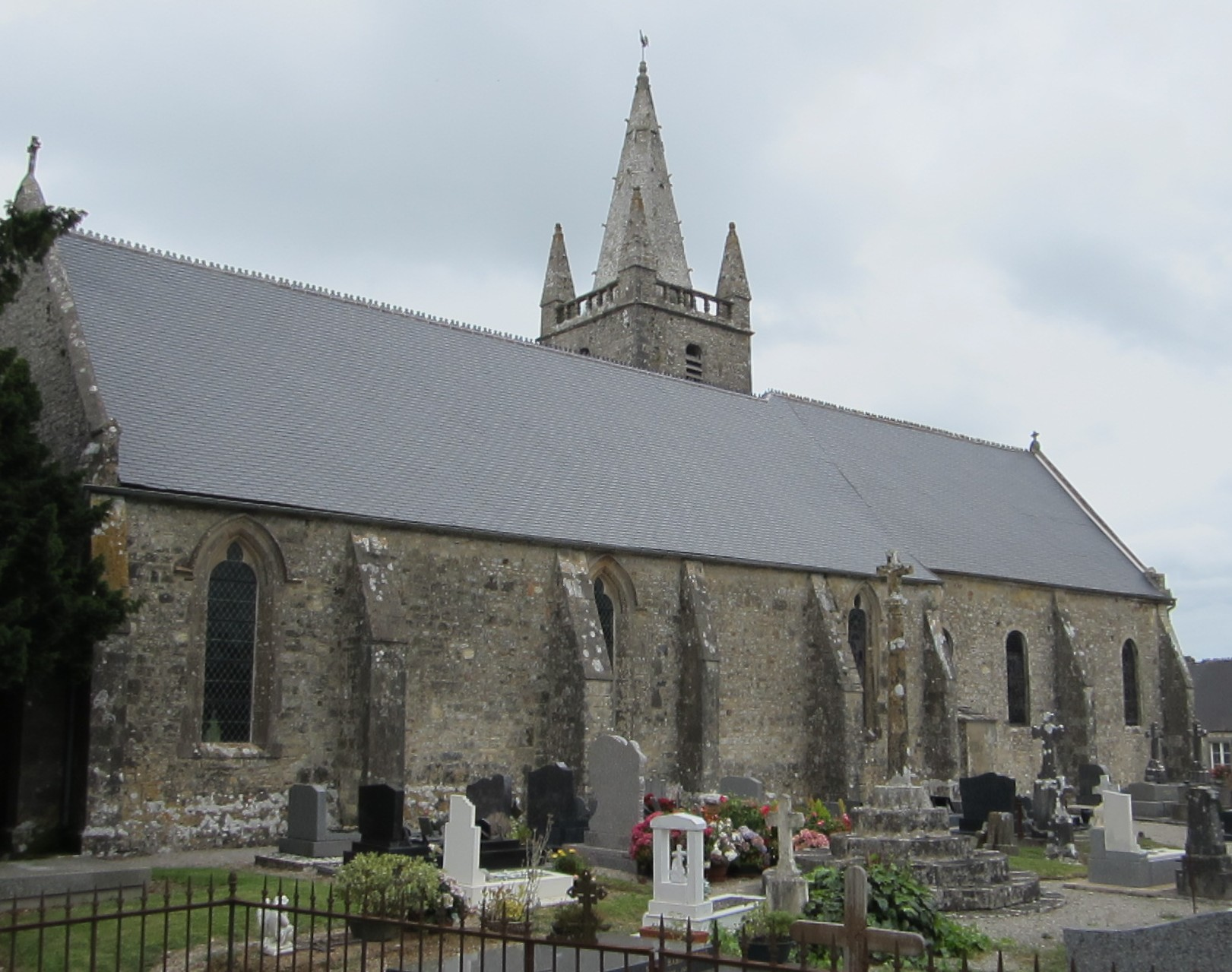 église Saint-Martin de Golleville